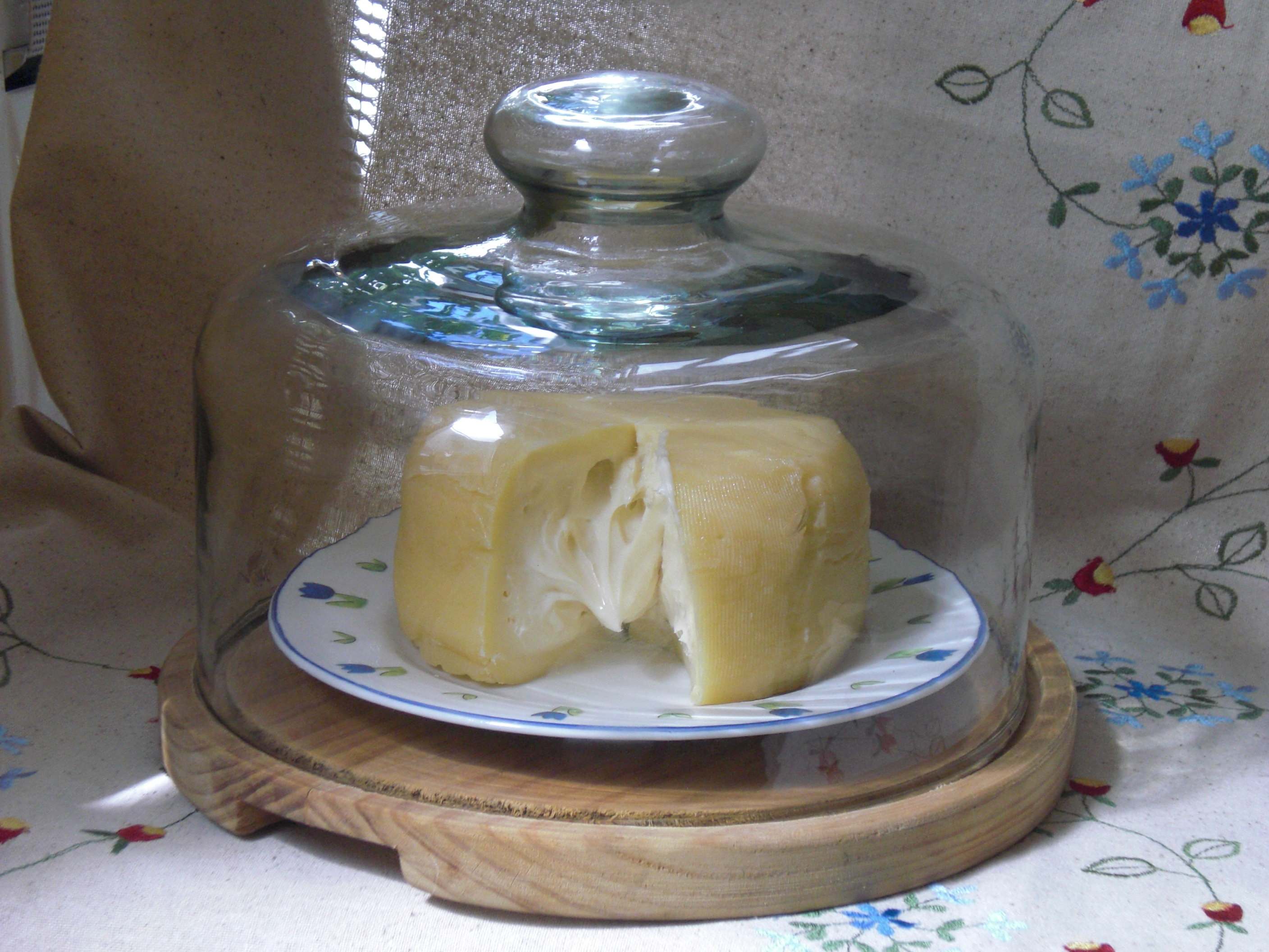 Fromaĝokloŝo